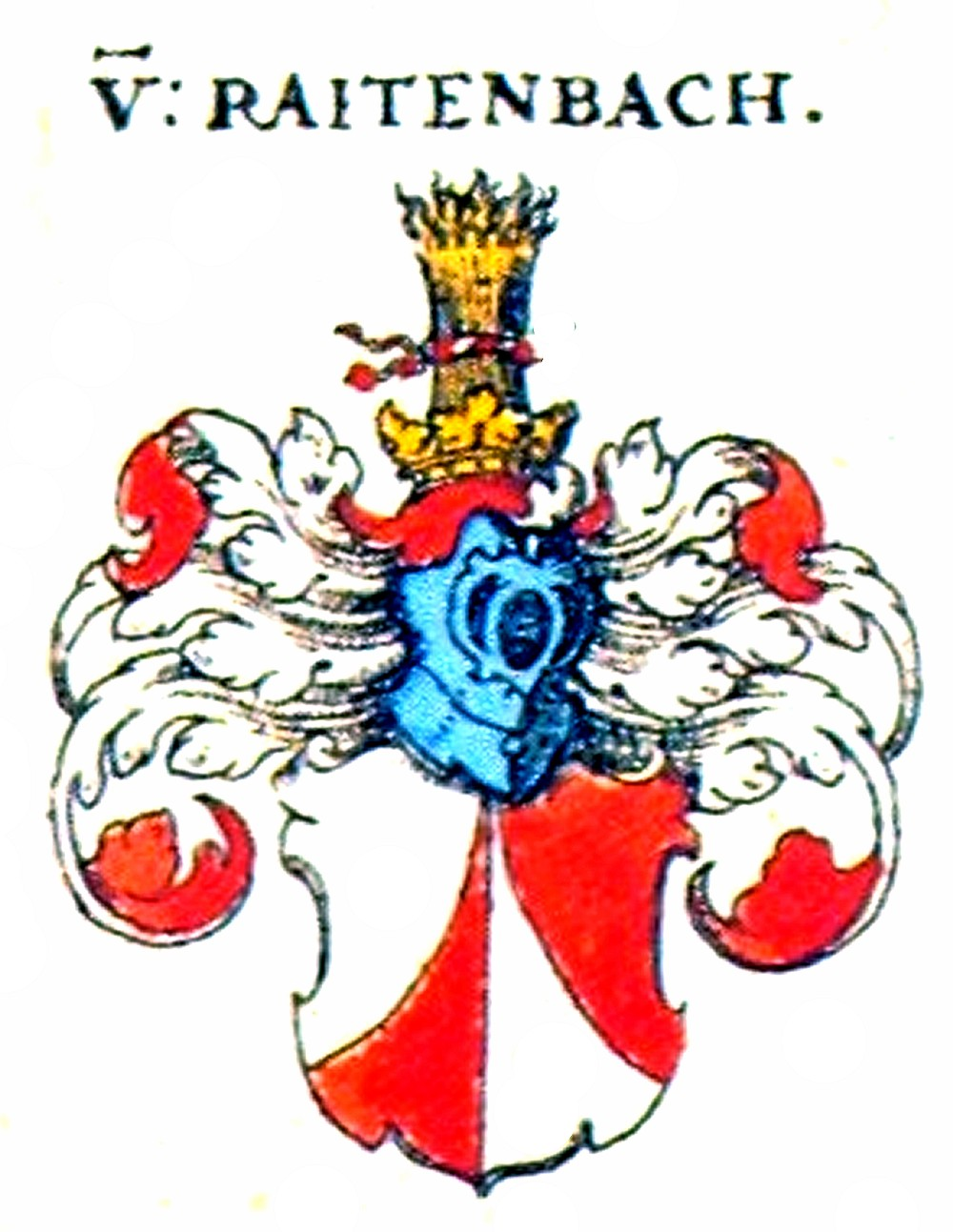 Wappen des fränkischen Adel- und Rittergeschlechts Raitenbach.